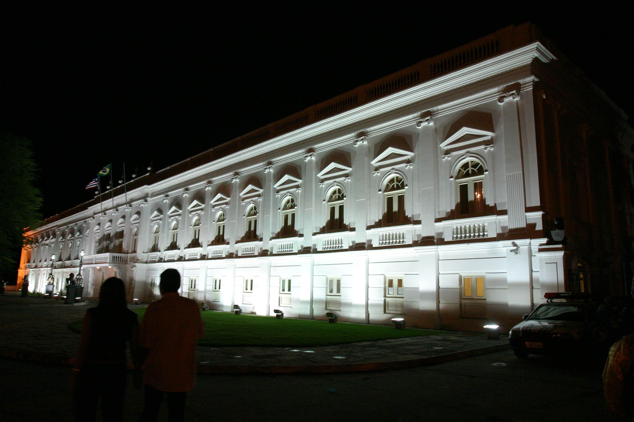 O Palácio dos Leões (São Luís), sede do governo do Maranhão.